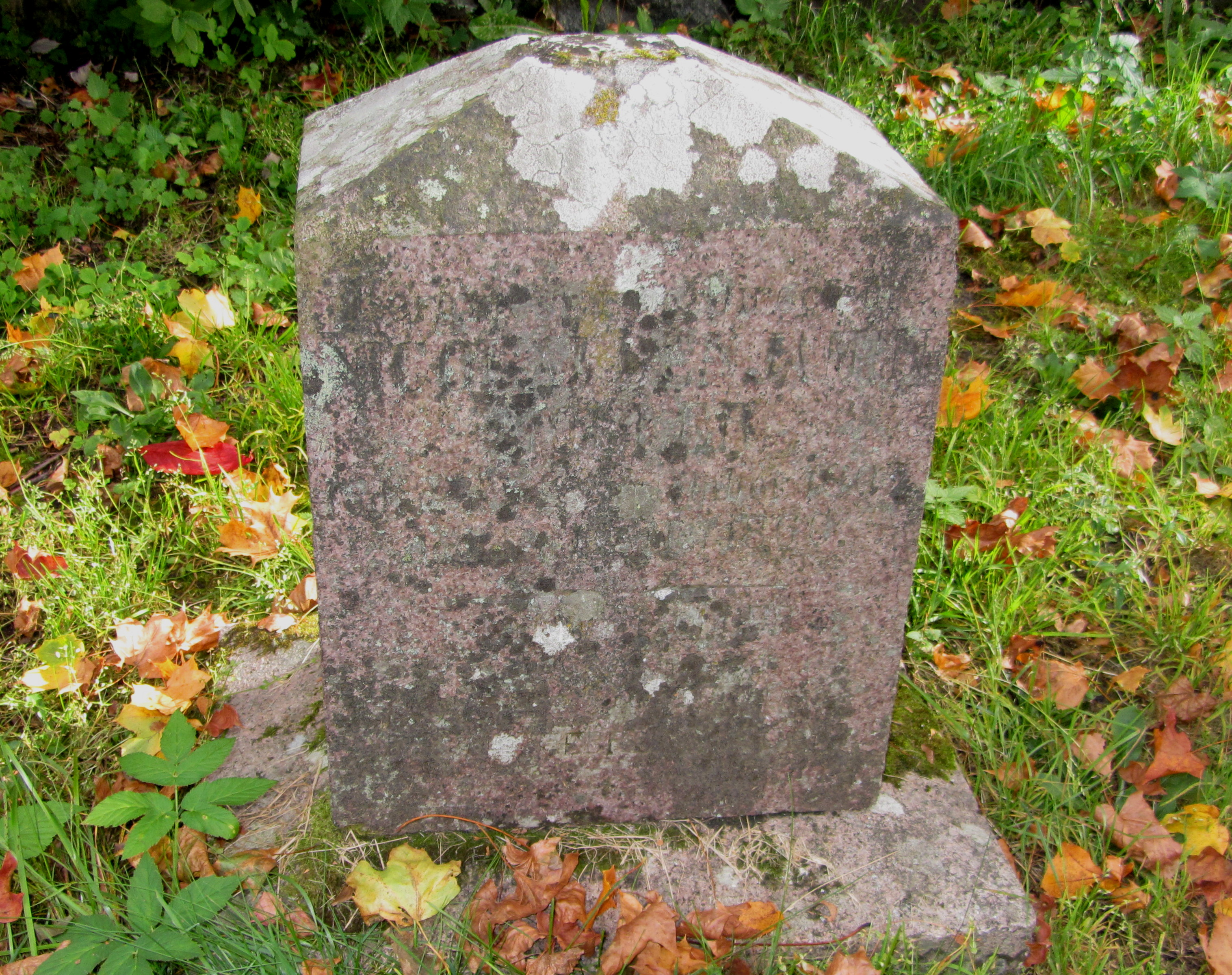 Gravminne på Seminarkirkegården, Kongsberg, for bergkandidat, sølvverksdirektør Nicolai (Nikolaj) Benjamin Møller (født i Gjerpen i dagens Skien kommune i 1802, død 1860).